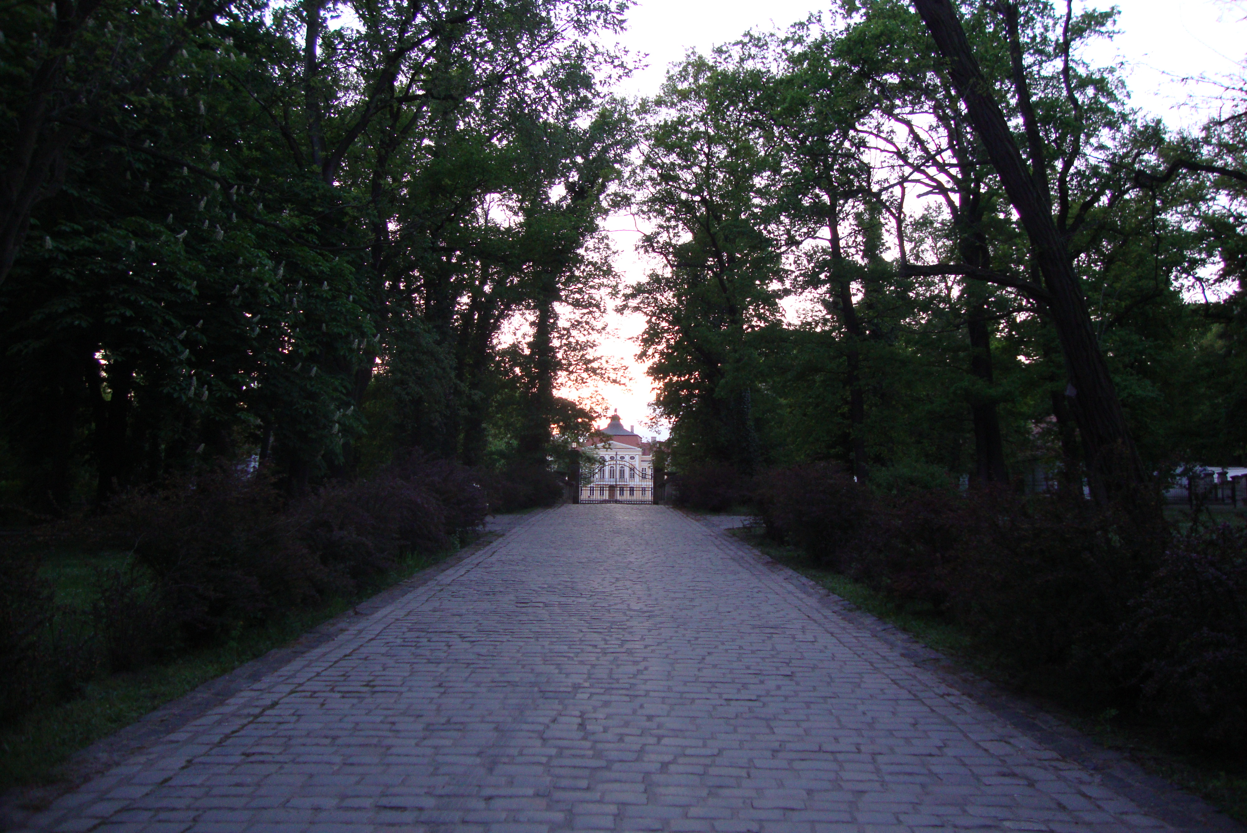 W tle fasada frontowa pałacu o zmroku.